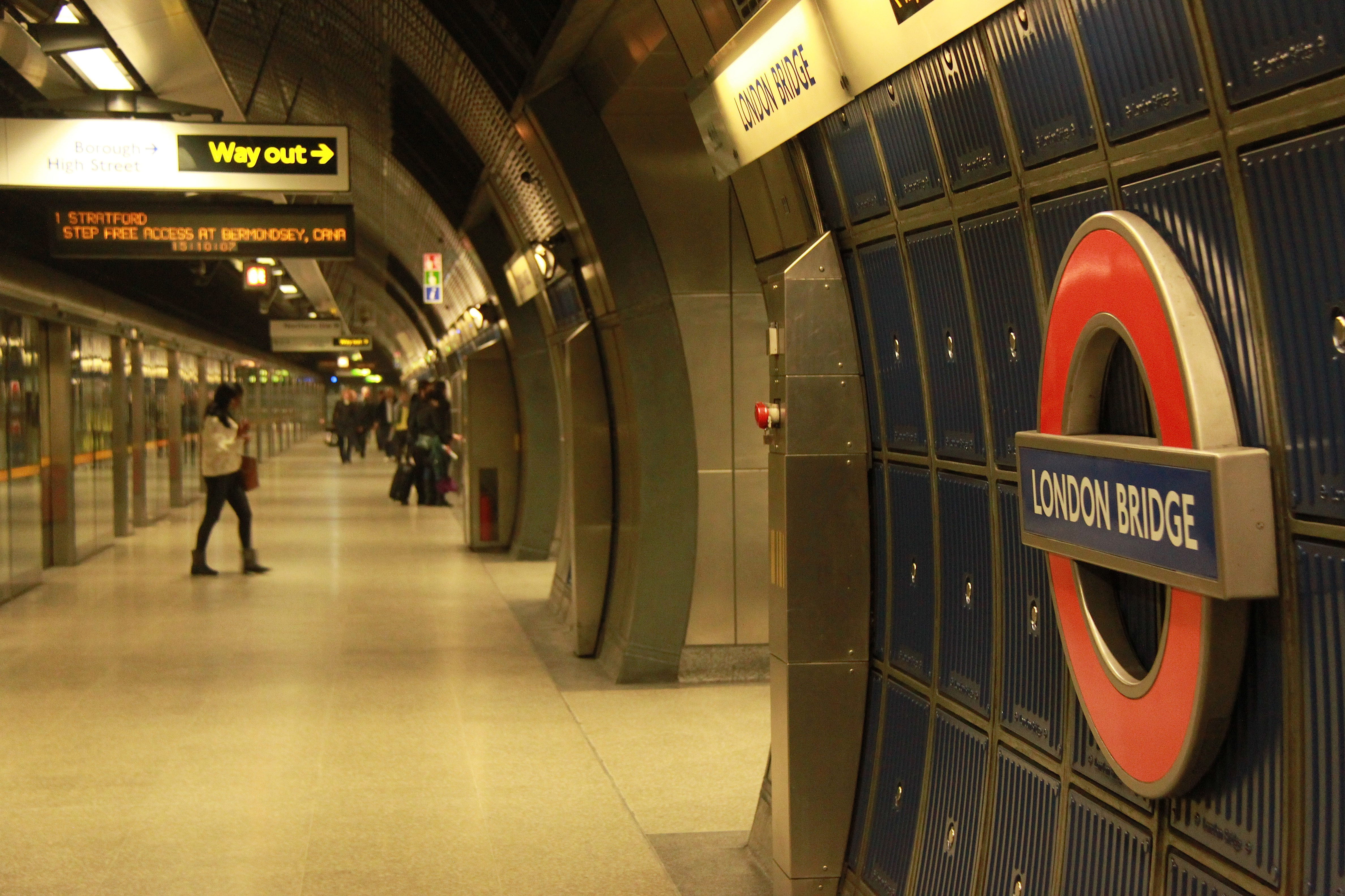 April 2012